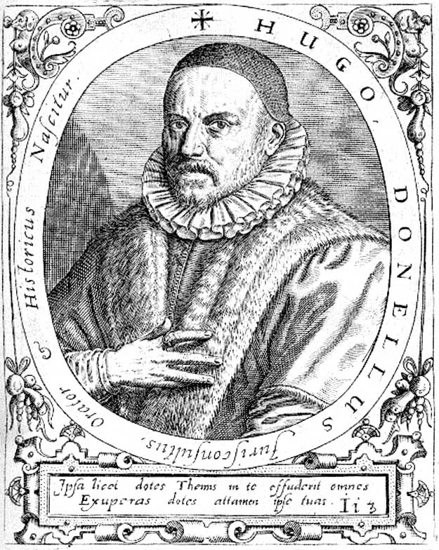 Hugo Donellus, (1527-1591), französischer Rechtswissenschaftler und Humanist